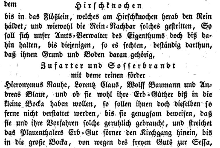 Andreas Blau wird auf Seite 40 erwähnt der Forst- und Holtz-Ordnung des Kurfürsten August zu Sachsen vom 8. September 1560, in: Georg Viktor Schmid: Handbuch aller seit 1560 bis auf die neueste Zeit erschienenen Forst- und Jagd-Gesetze des Königreichs Sachsen, Erster Theil Forstgesetze, bei F. W. Goedsche, Meißen 1839, S. 40 Digitalisat